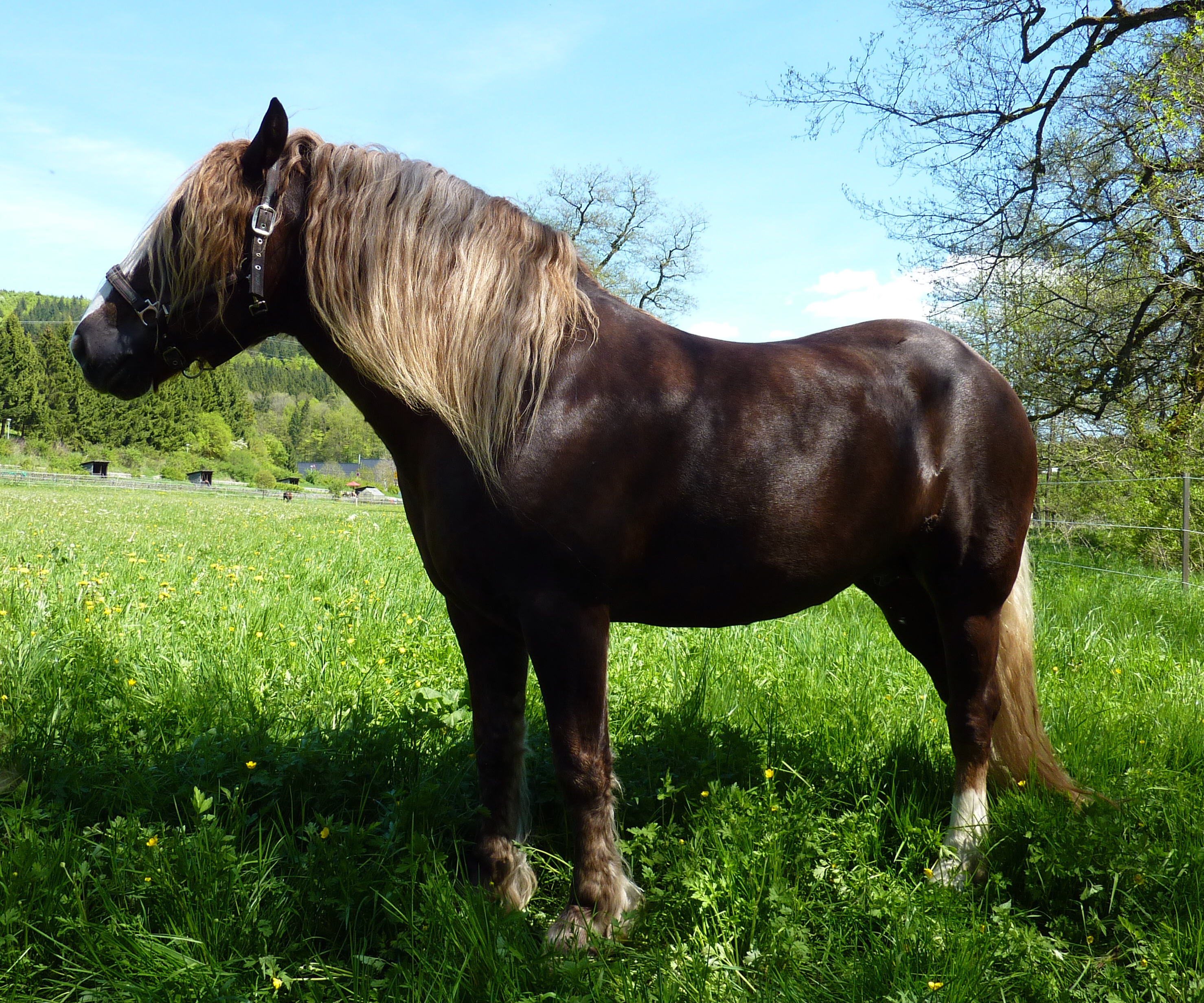 Schwarzwälder Kaltblut